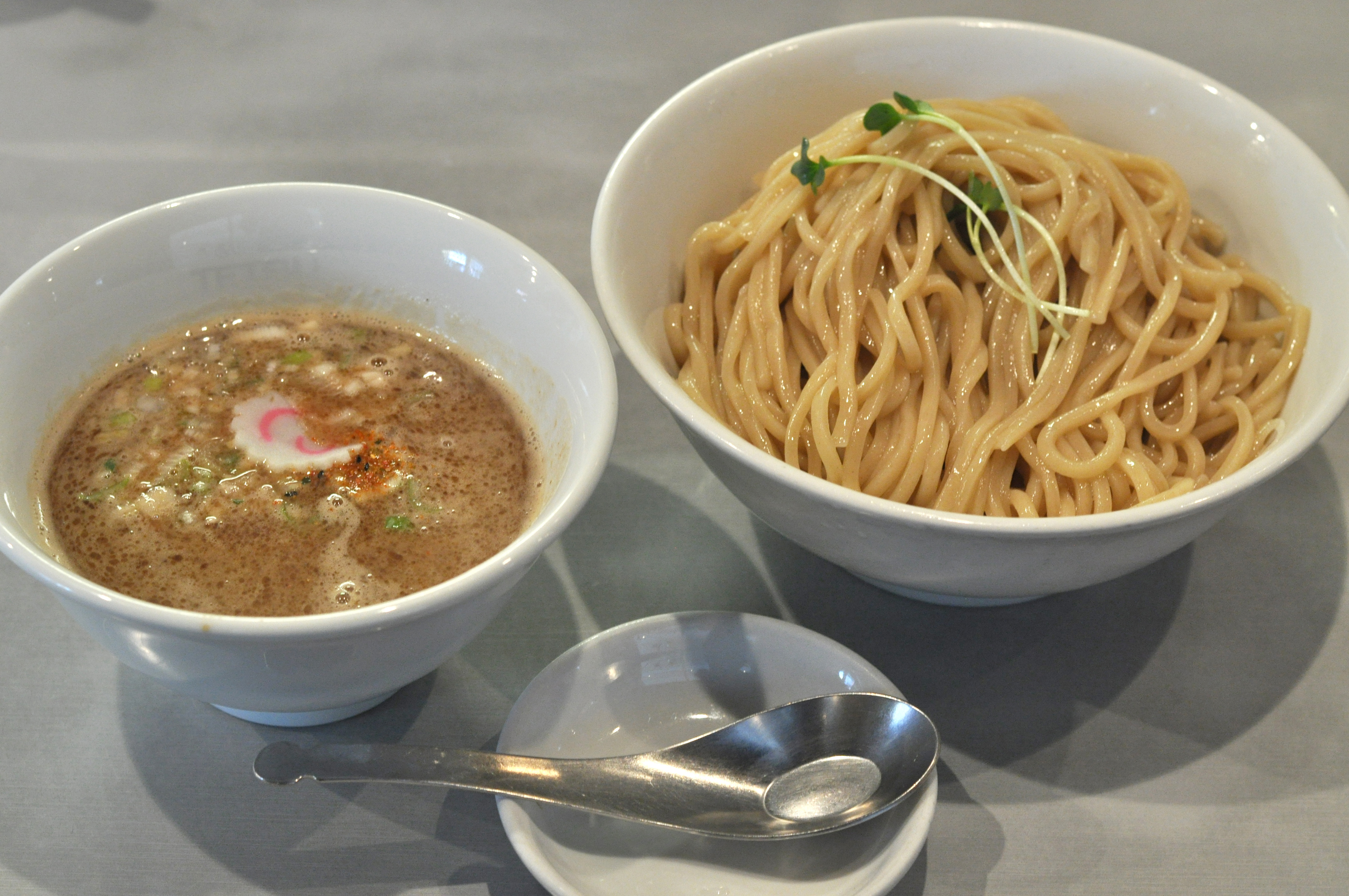 埼玉県さいたま市大宮区にある「つけめん102」のつけめん大盛り